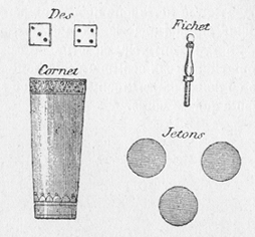 Accessoires du jeu de trictrac. Provenance : livre "le salon des jeux", sd (c. 1900) Emile Guérin éditeur Philippe Lalanne 2 octobre 2006 à 22:44 (CEST)